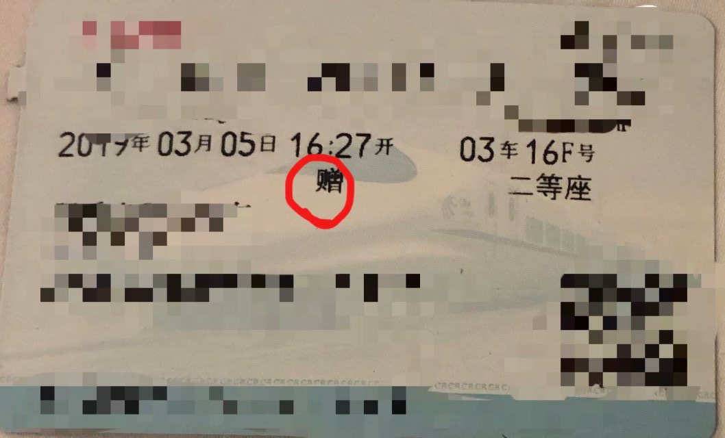 中文（中国大陆）: 铁路畅行常旅客计划积分所兑换的车票，票面上并无价格，加注“赠”字样。